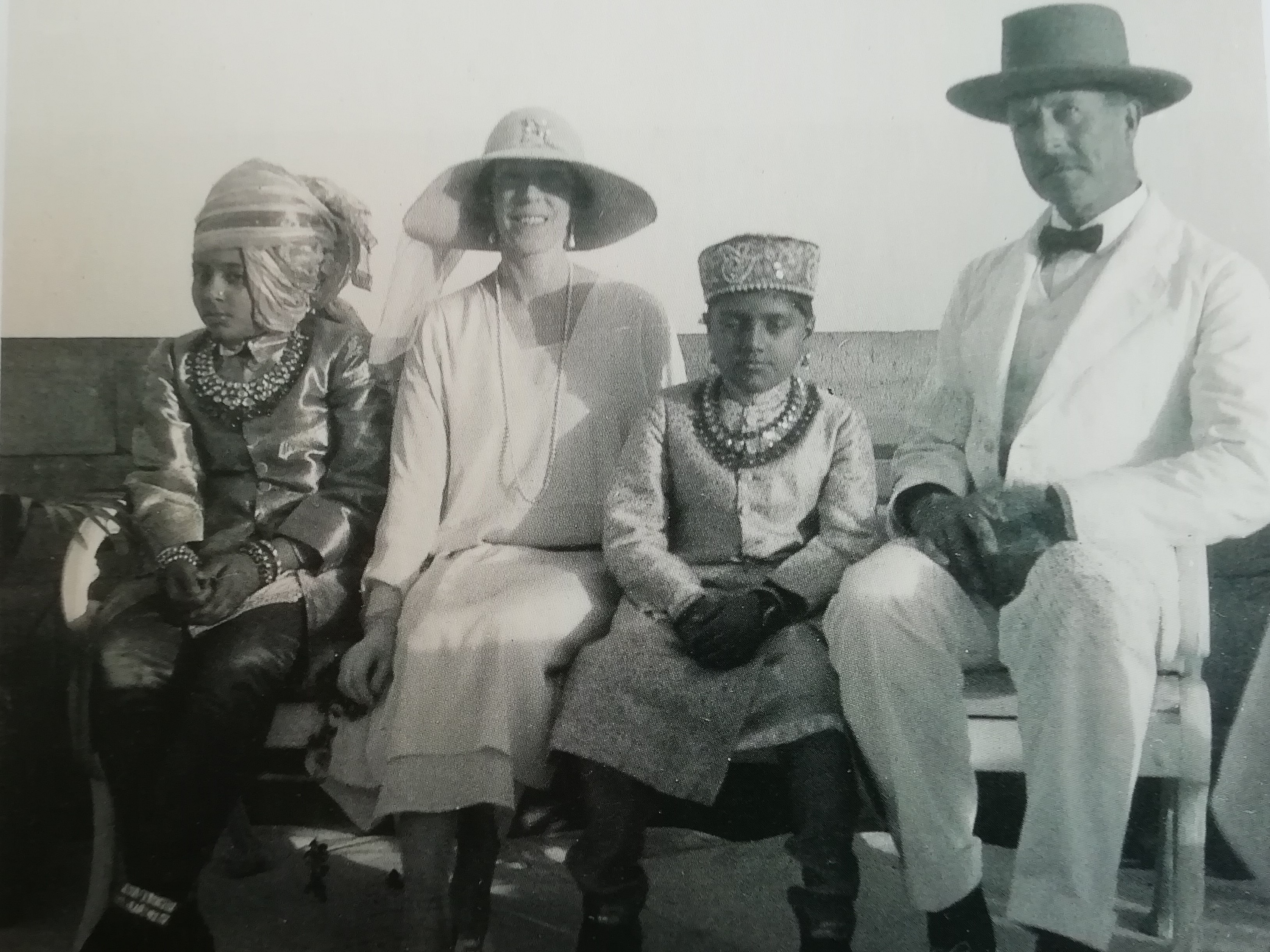 Le roi Albert et la reine Élisabeth aux Indes posent en compagnie de deux enfants